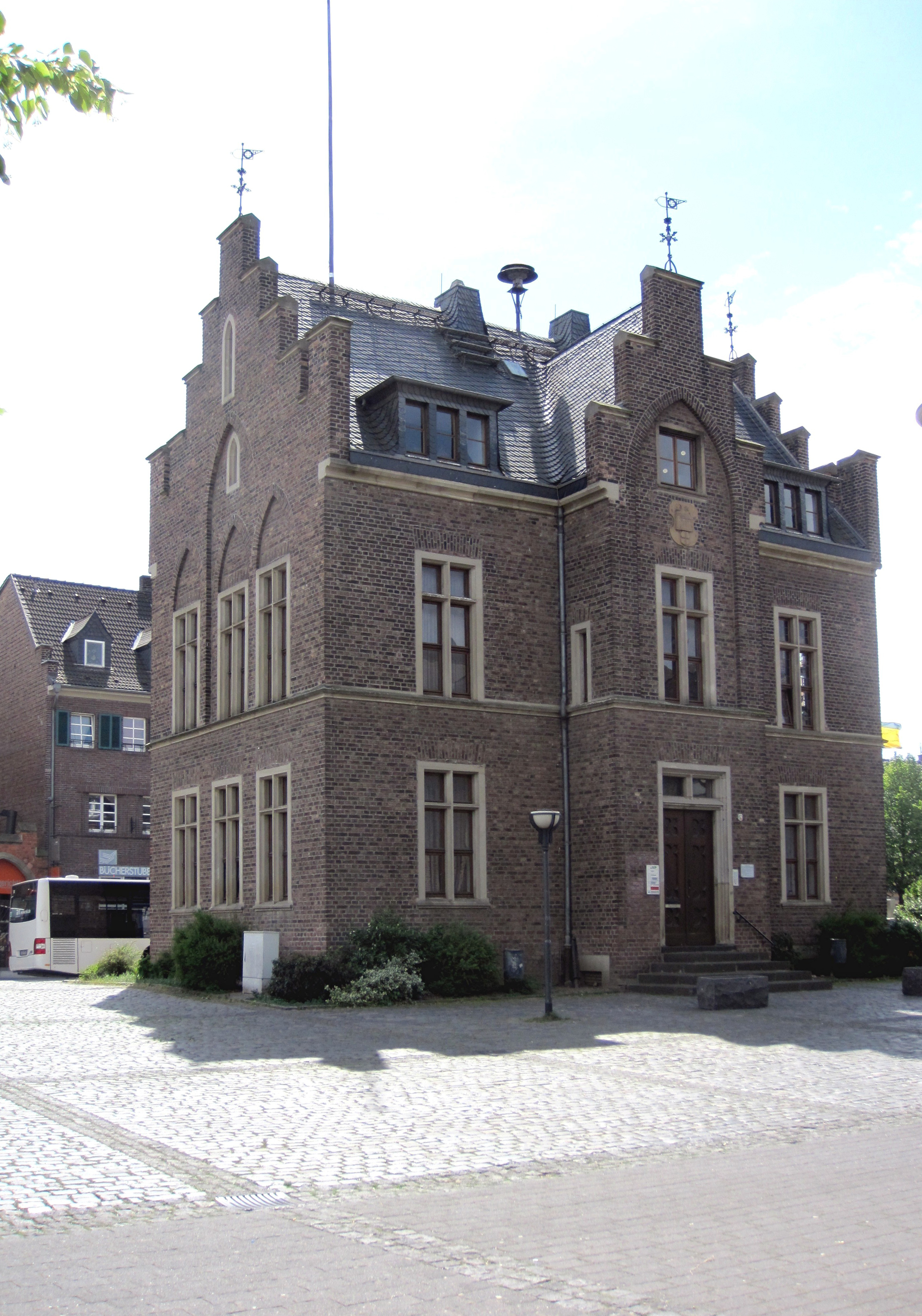 Lechenich Markt Rathaus von Nordwesten